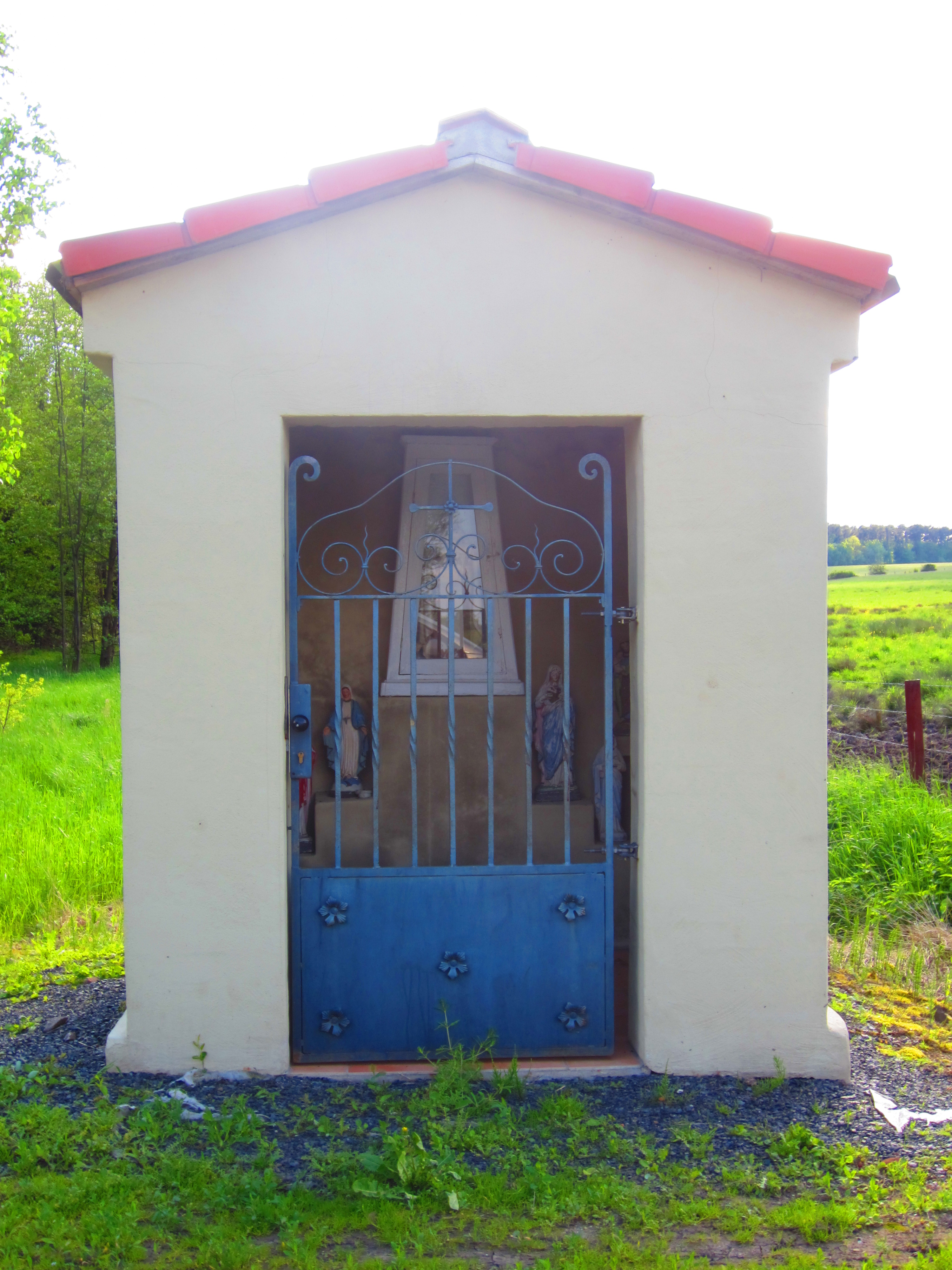 Oratoire St Francois Lacroix